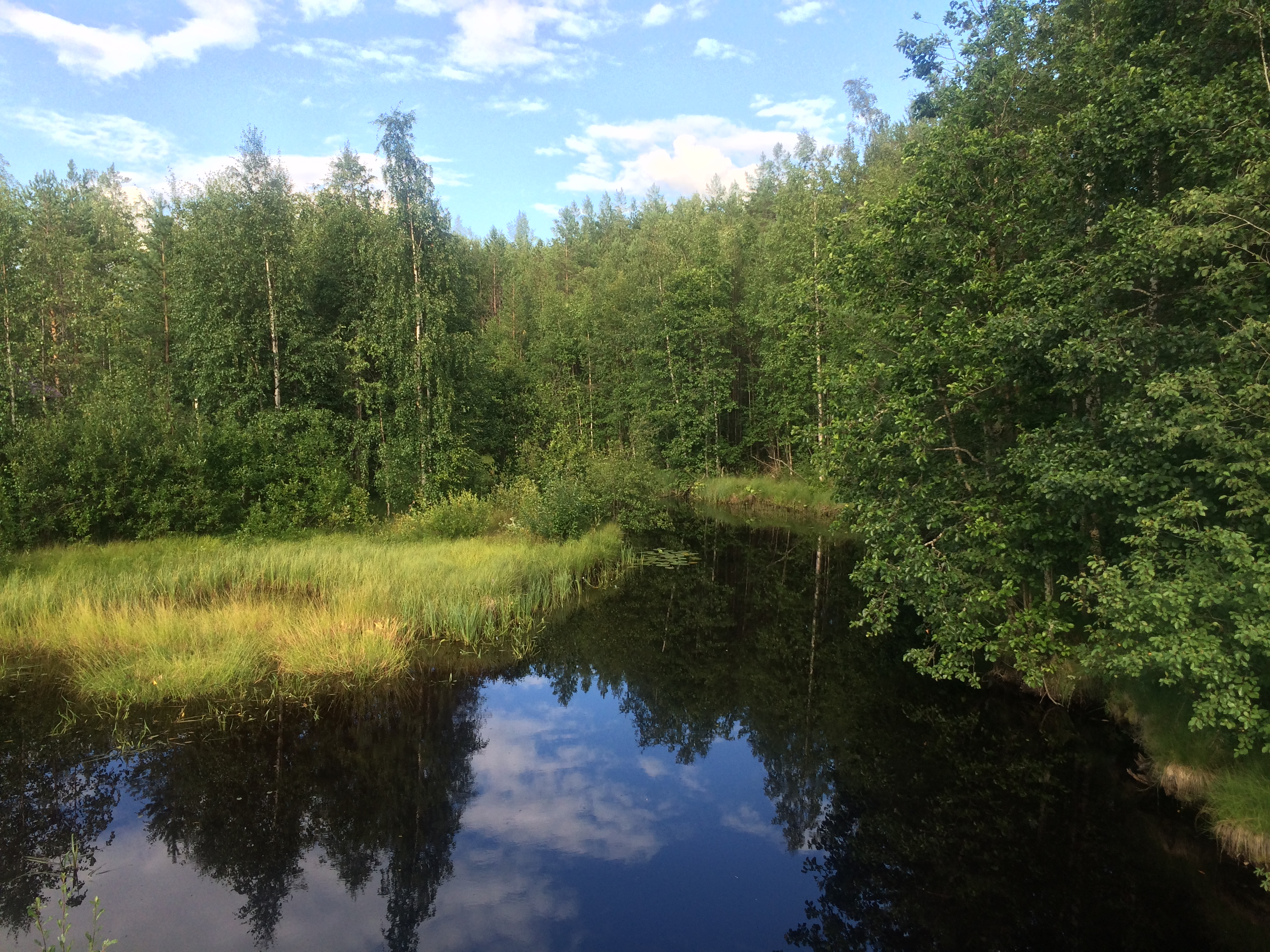 Кудама (река)